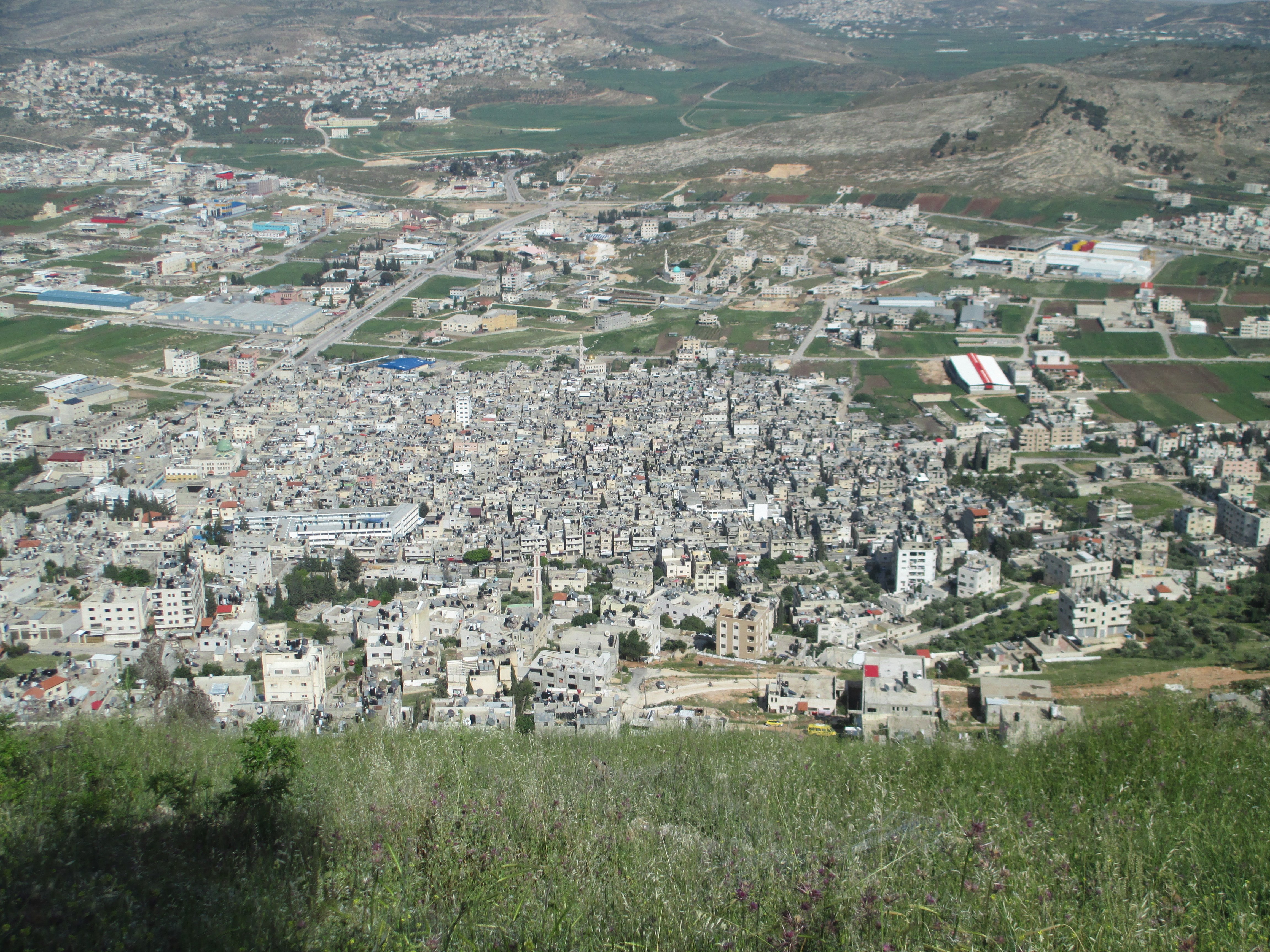 מחנה הפליטים בלאטה מצולם ממצפה יוסף